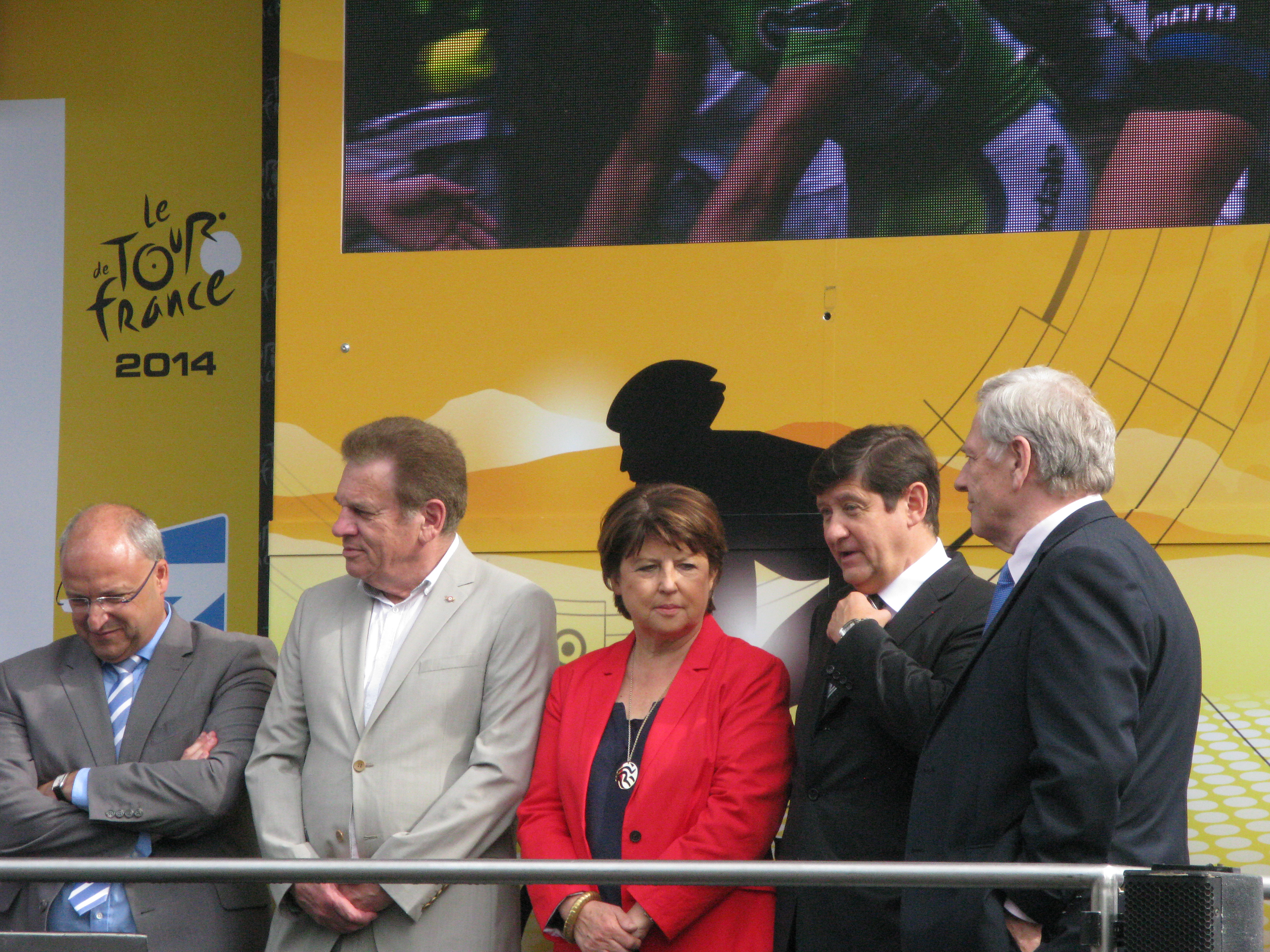 Damien Castelain, Gérard Caudron, Martine Aubry, Patrick Kanner, Pierre de Saintignon. Podium de l'arrivée de la 4e étape du Tour de France 2014 à Villeneuve-d'Ascq.